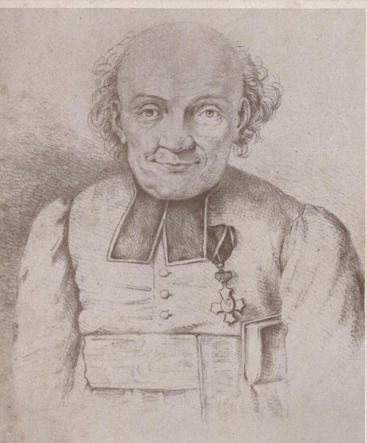 Johann Michael Schang, Pfarrer von Pirmasens, Pfalz